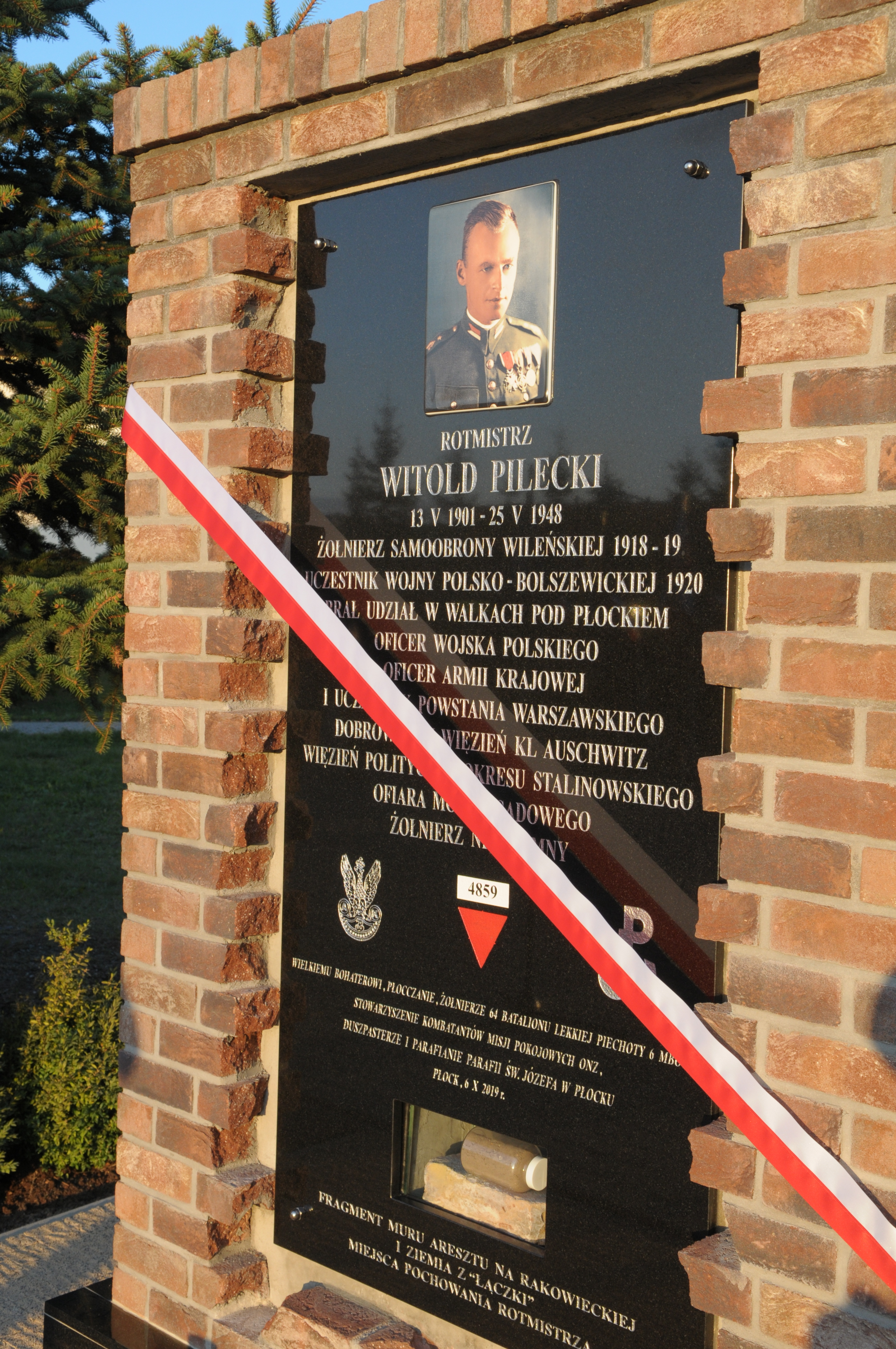 Projekt tablicy wykonał kpr. Cezary Okraszewski z 64 batalionu lekkiej piechoty w Płocku, inicjator i organizator przedsięwzięcia.